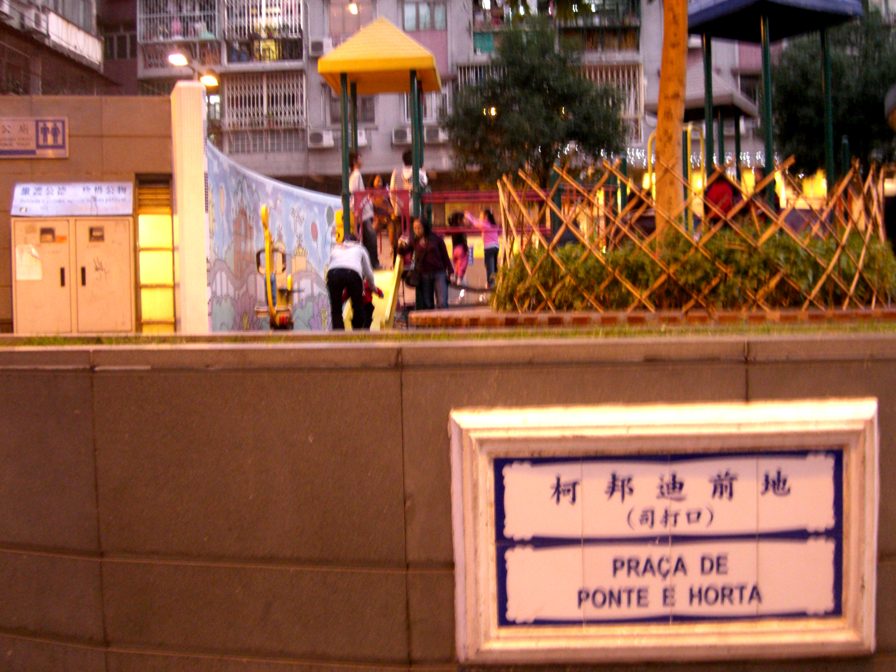 柯邦迪前地